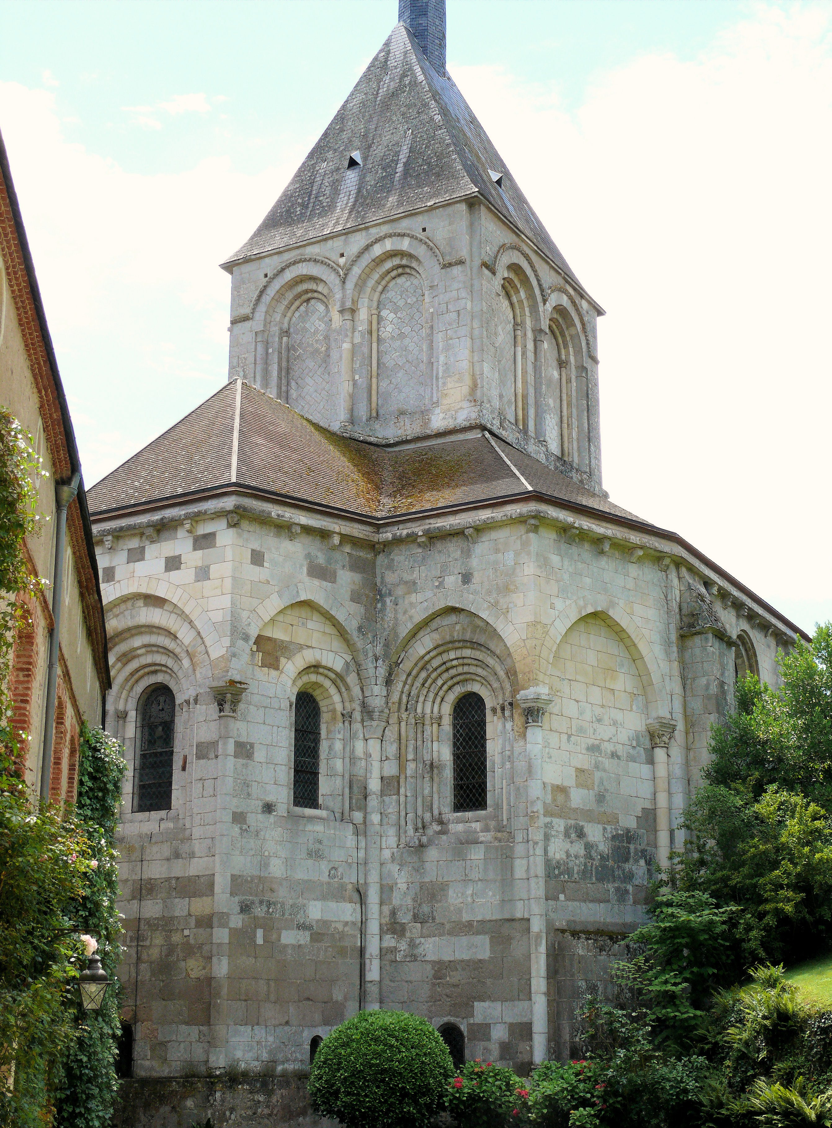 Gargilesse-Dampierre - Eglise Notre-Dame - Chevet